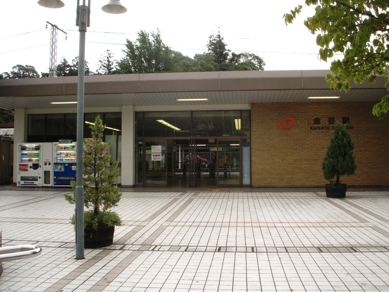 金谷駅